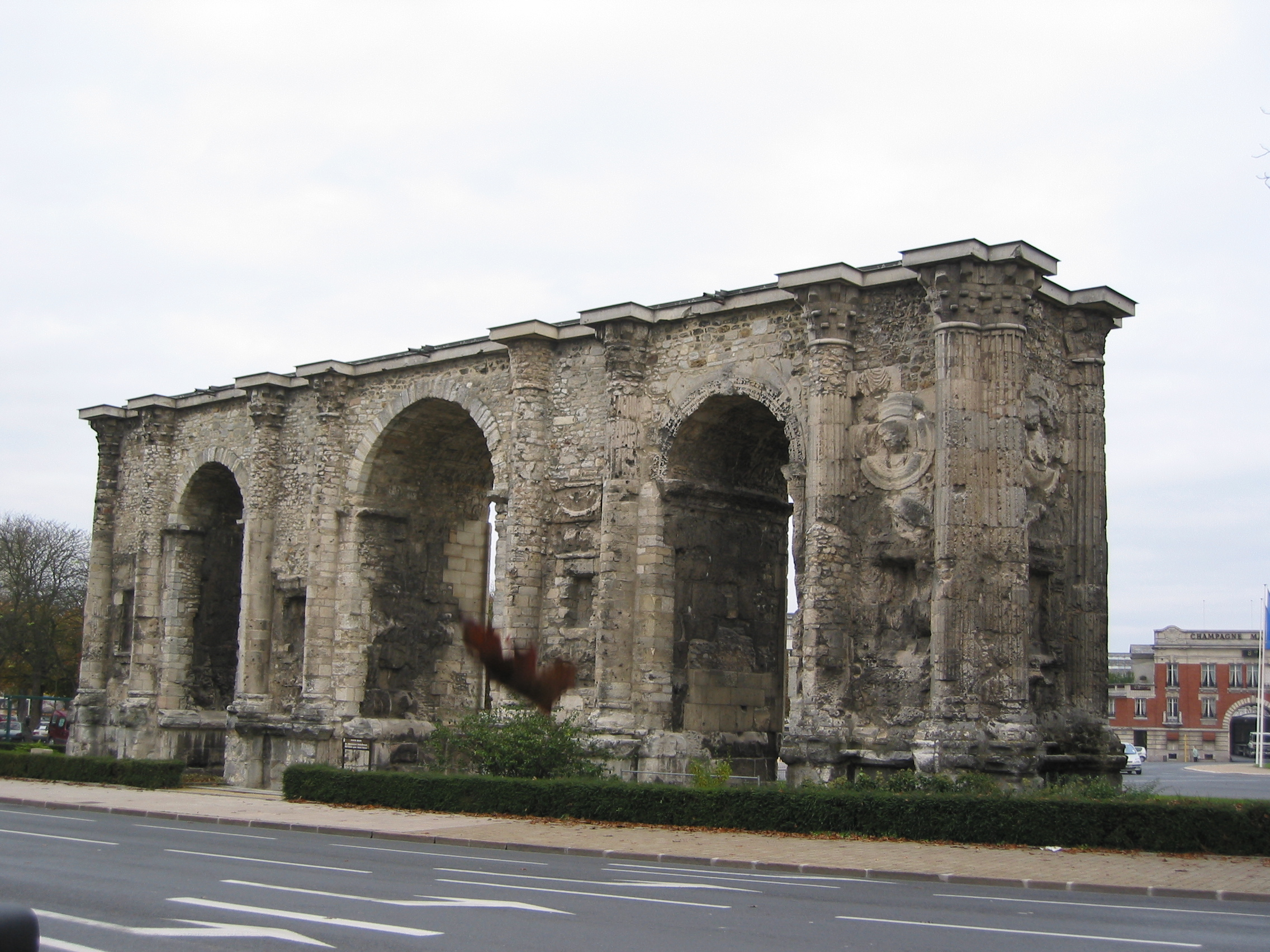 Reims, France.